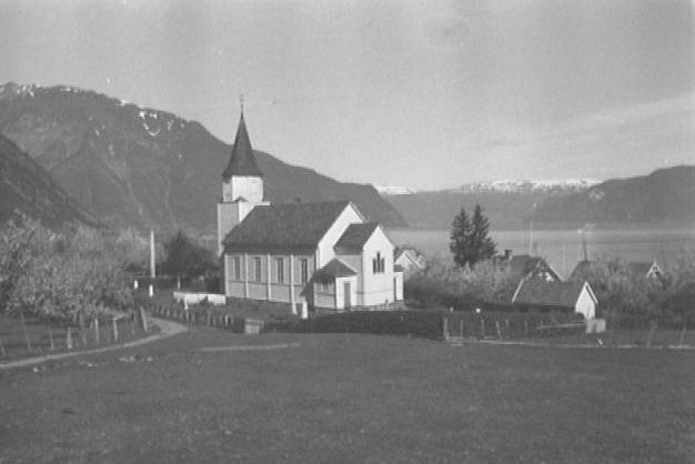 Fresvik kyrkje